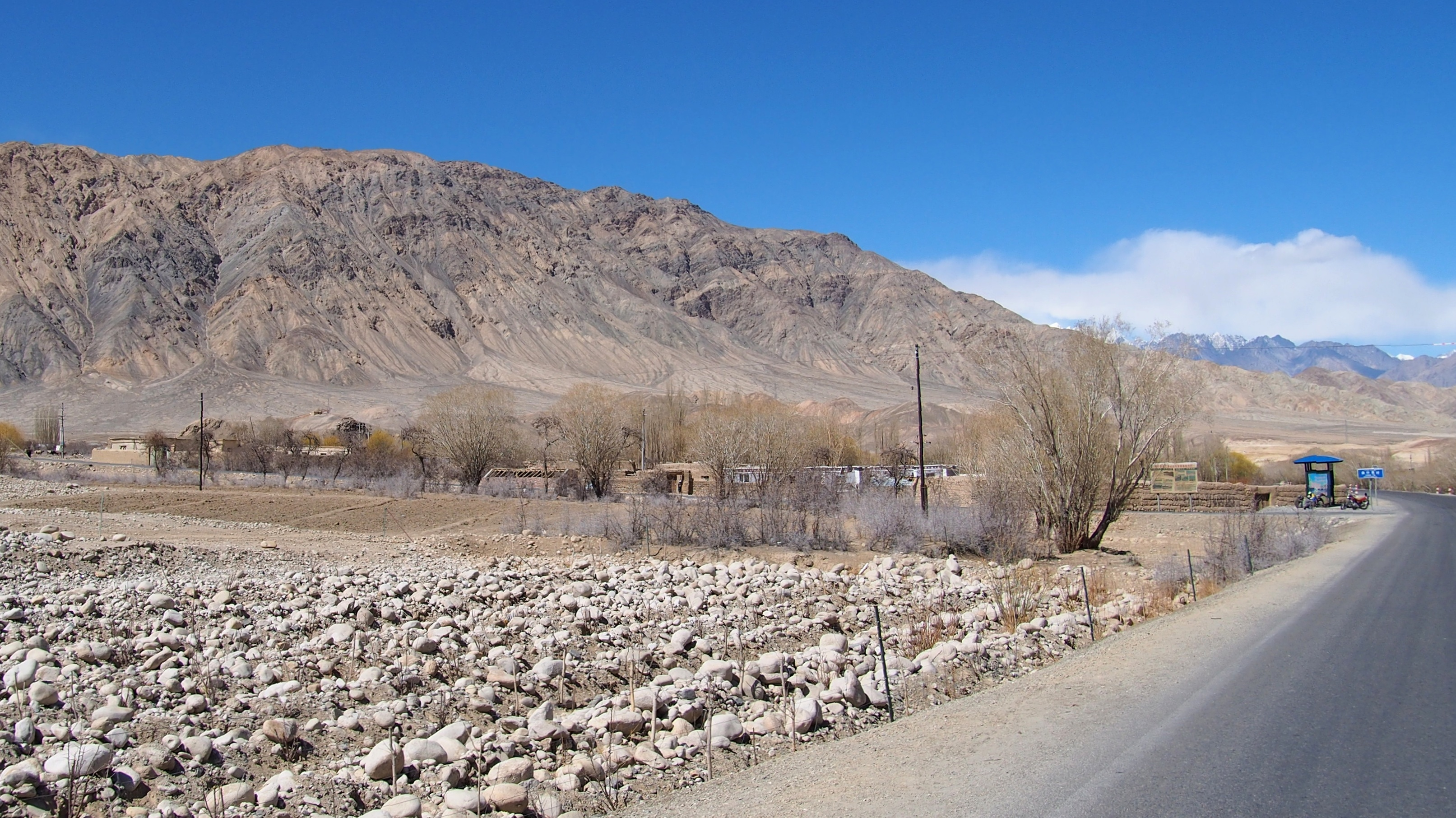 曲什曼村 - Quman Village - 2015.04